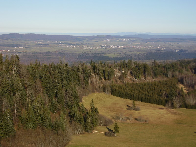 Photos de Pierrefontaine-Les Varans prise en 2006 par FredK depuis la Roche Barchey